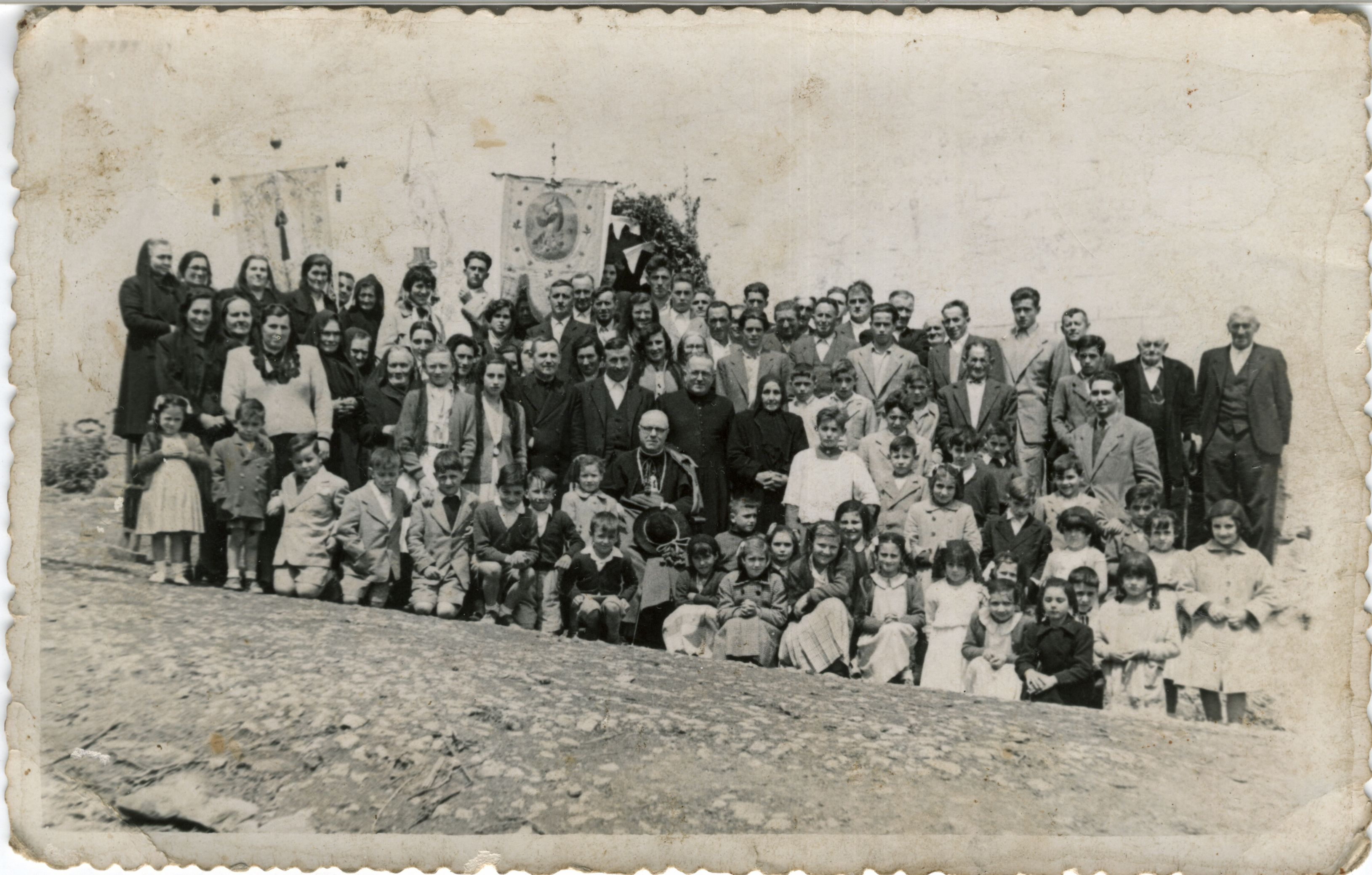 Data zehatza eta argazkilaria ezezagunak. Argazkia Astigarretako elizaren atarian 1953. urte inguruan aterata dago eta Astigarretako bizilagunak urte horretan egin zen auzoko Konfirmazio ekitaldian agertzen dira. Erdian eseririk agertzen dena orduan Jaume Font i Andreu Donostiako gotzain kataluniarra zena da. Soportea paperean 137*87mm. Egilea ezezaguna denez, No Known Copyright Restrictions baimena atxikitu diot. Argazkia Astigarretako Arsuaran baserrian agertu zen eta bere inguruko informazio osagarria Muxika baserriko Pedro Mari Alustizak 2009ko urriaren 17an osatu zuen. Flickr webgunean GipuzkoaKultura erabiltzaile pean Pedro Marik identifikaturiko hainbat bizilagun agertzen dira